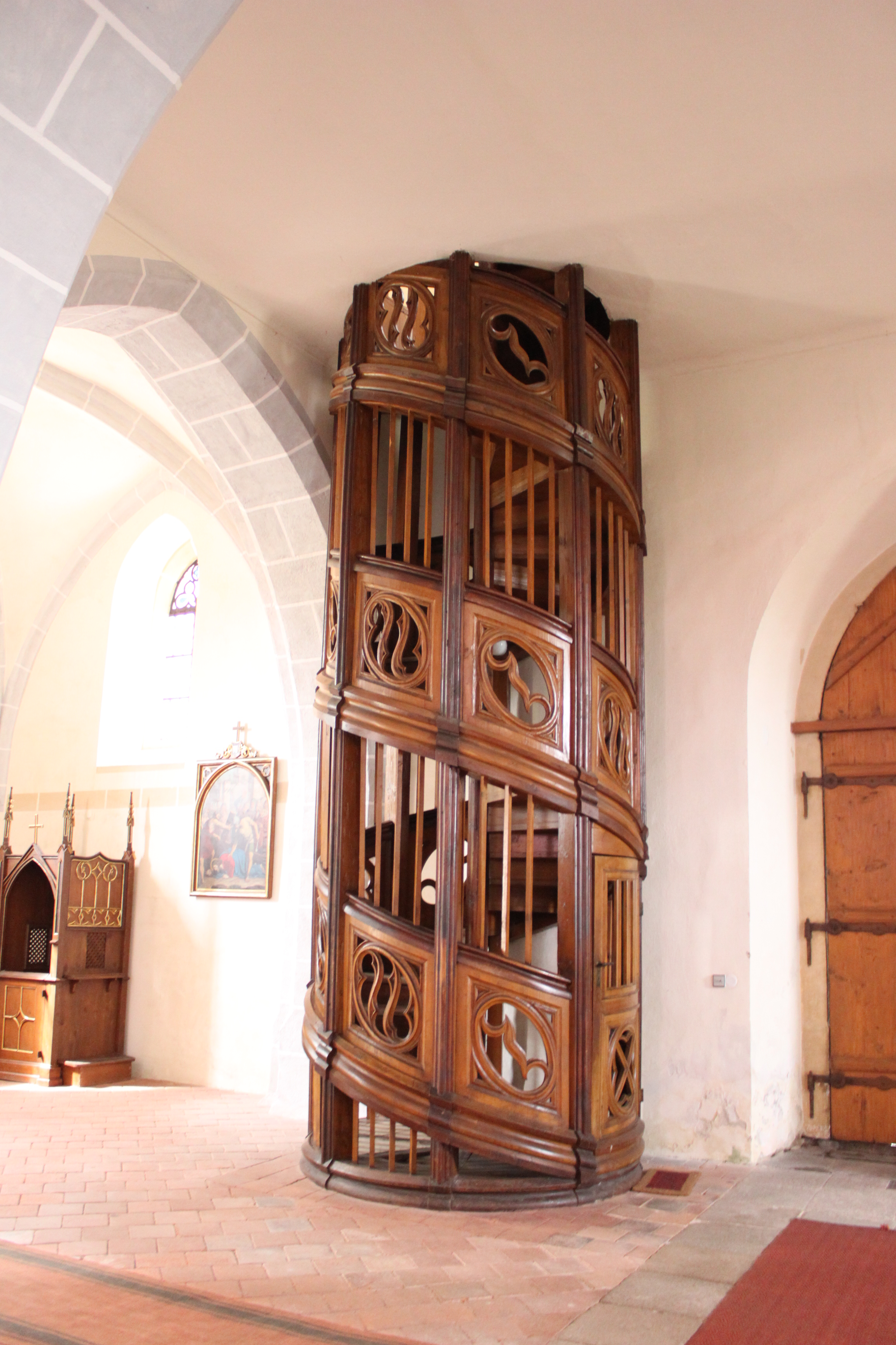 Kostel sv. Jakuba v Nepomuku, točité vřetenové schodiště